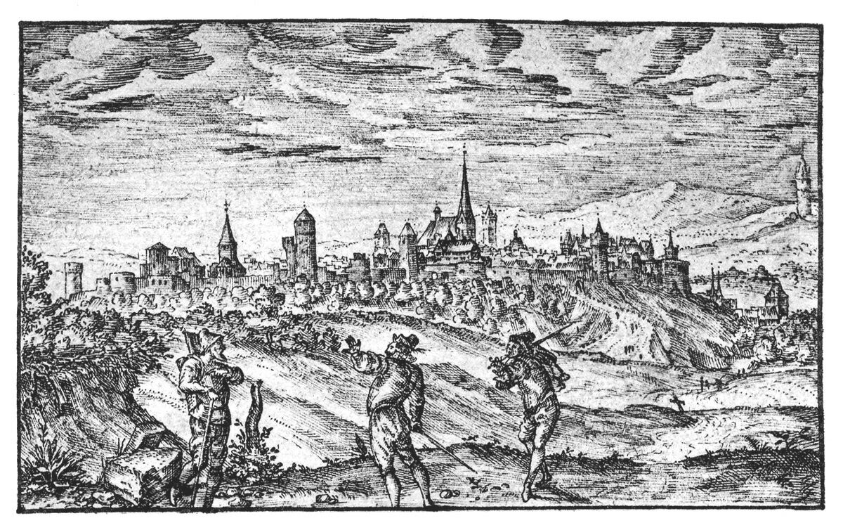 Ansicht von Grünberg (Hessen), 1591